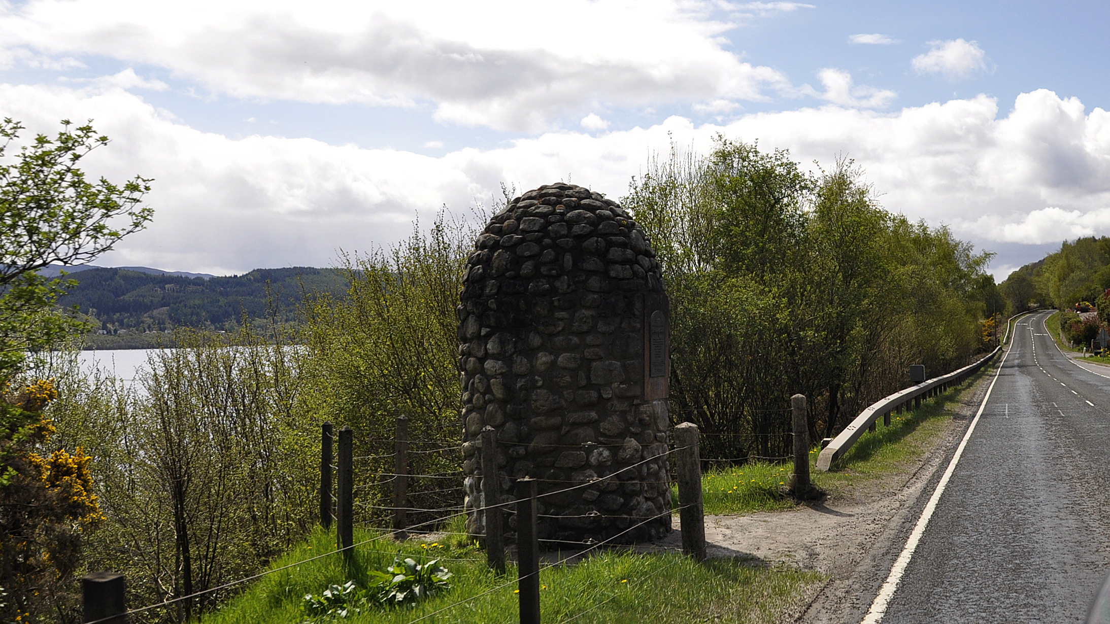 Het memoriaal voor John Cobb aan de oever van Loch Ness, Schotland